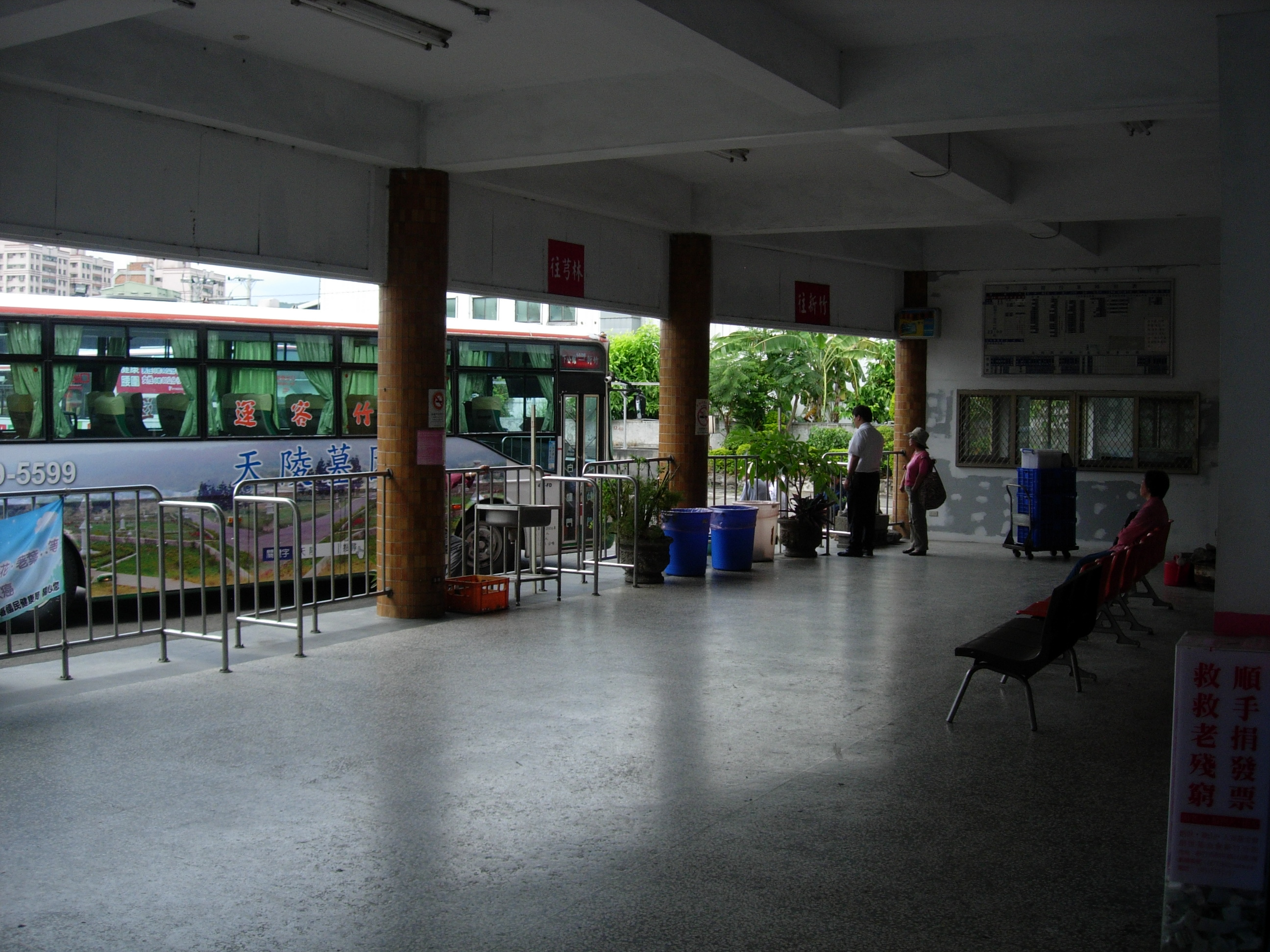 中文（台灣）: 新竹客運下公館站月台1